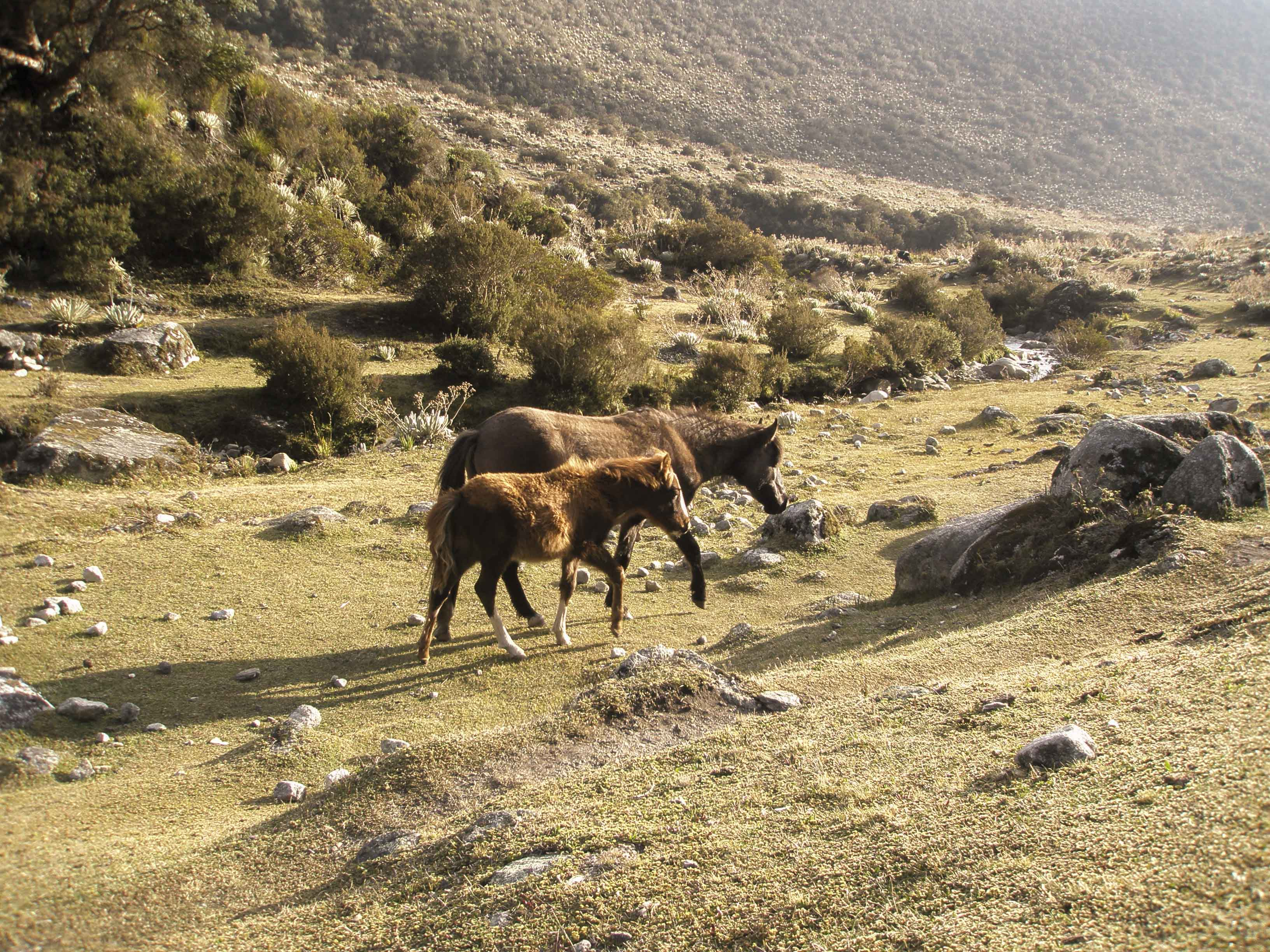 Foto tomada en el Parque Nacional Sierra de La Culata